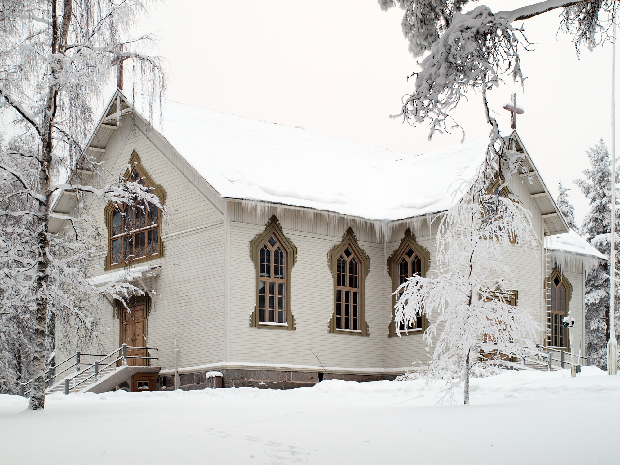 Koskenpään kirkko tammikuussa 2010.